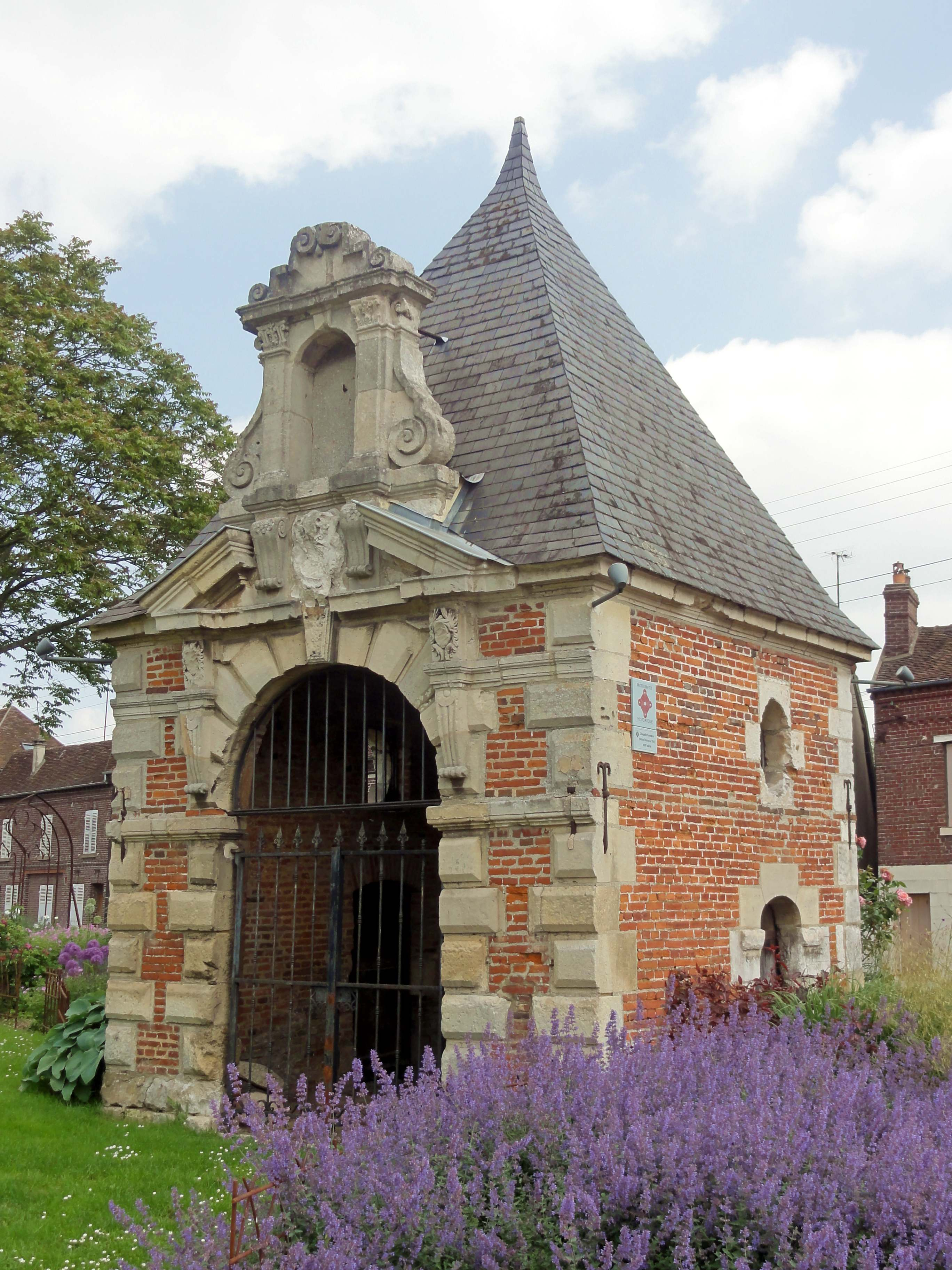 Ancienne chapelle funéraire du cimetière de Notre-Dame-du-Thil.